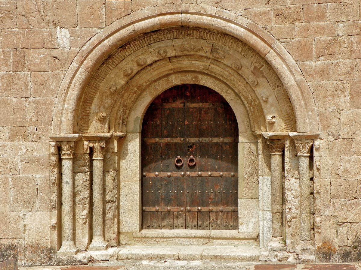 Portalada de Sant Fructuós de Llo